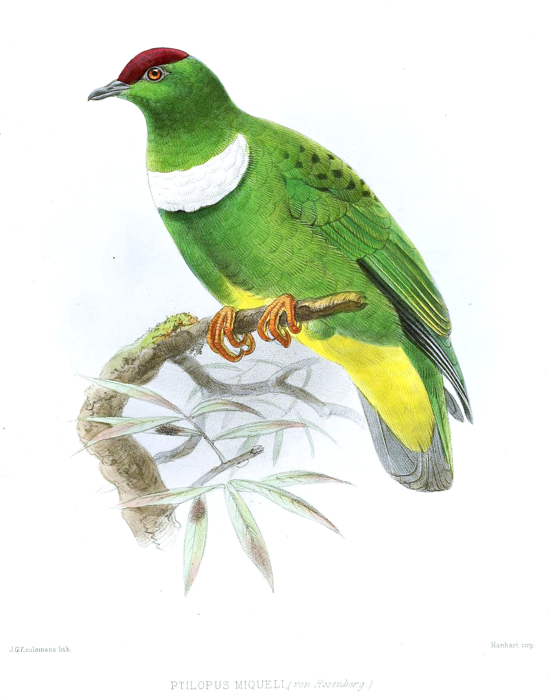 Ptilopus miqueli=Ptilinopus rivoli